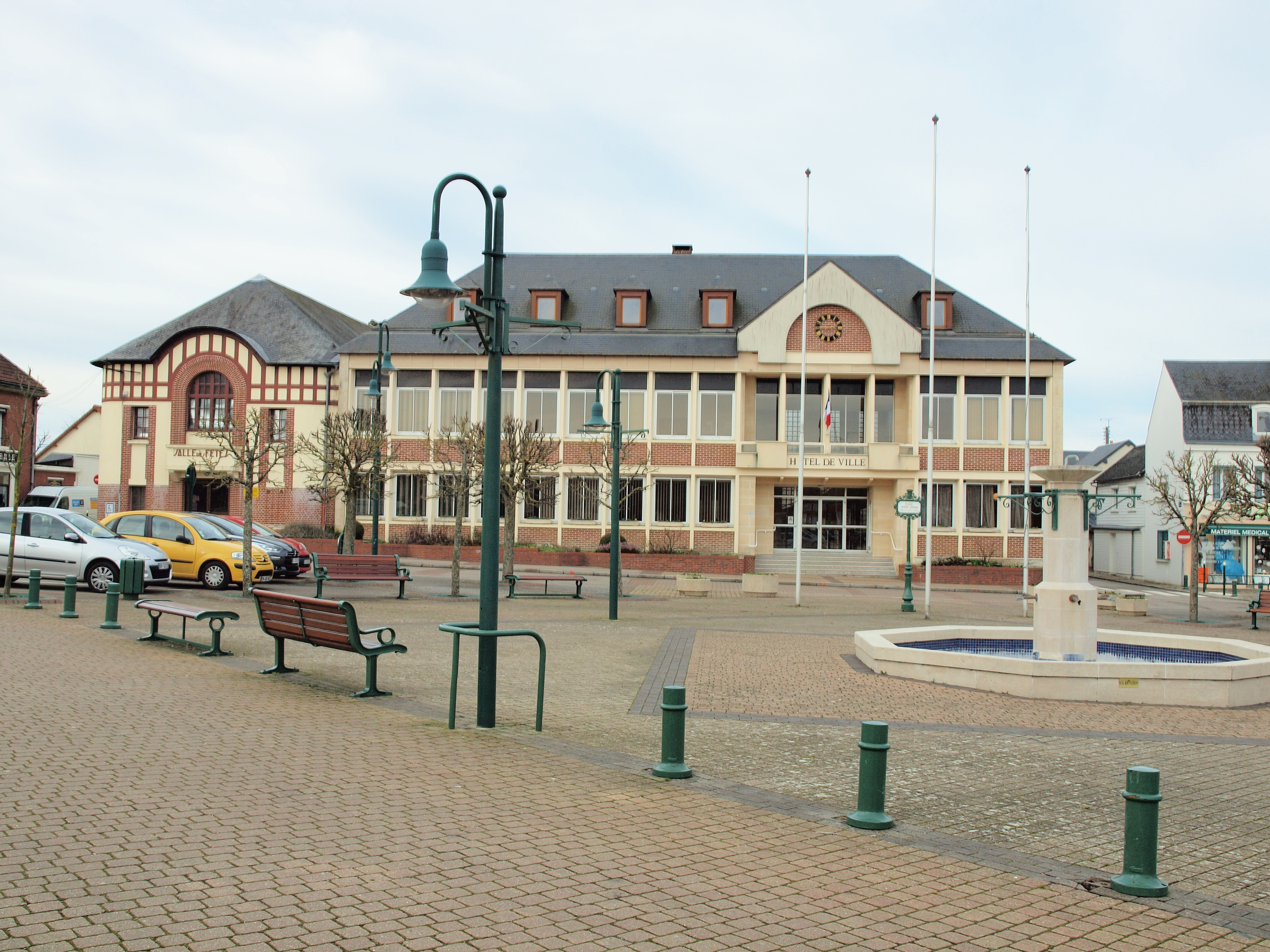 Formerie (Oise, France)